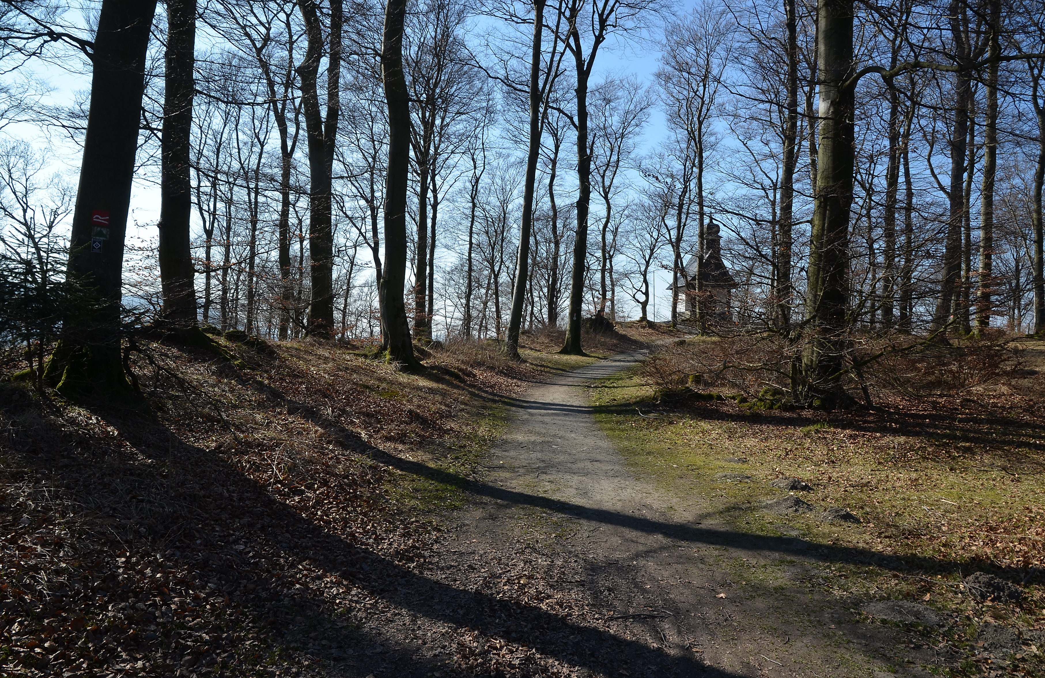 Brilon, Borberg, die Wallanlage mit Kapelle